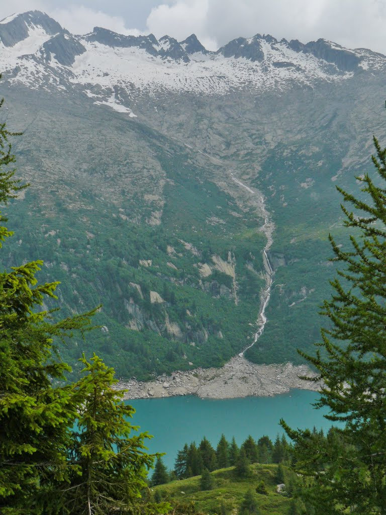 Lago d'Arno